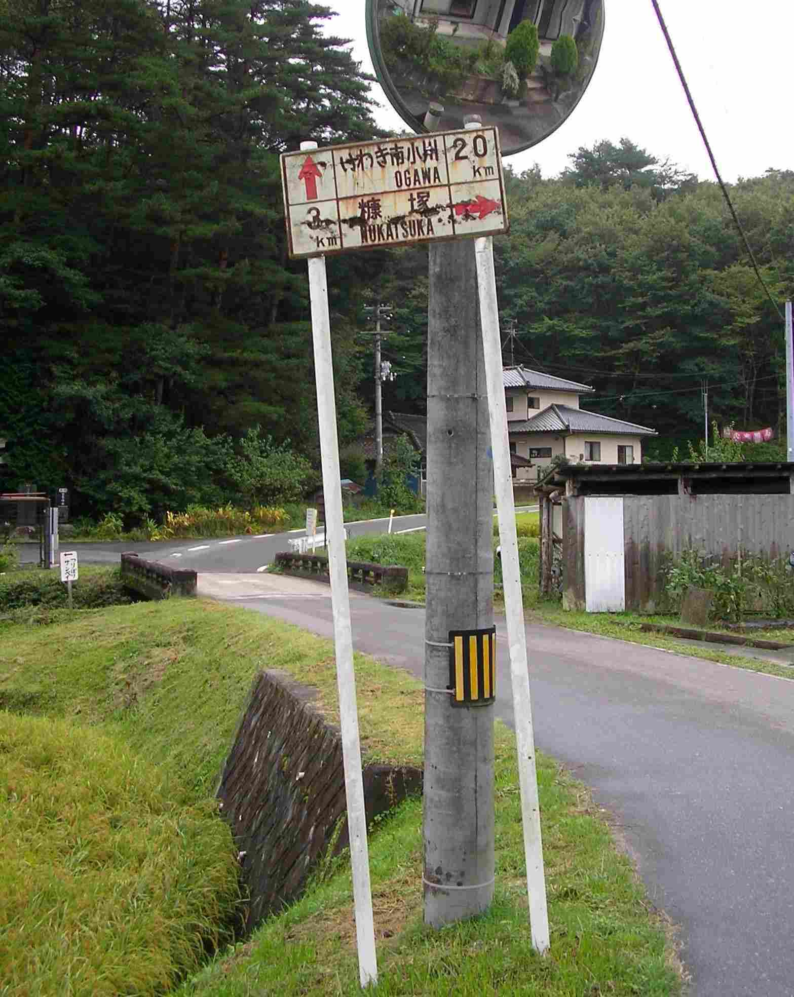 旧式な距離表示標と、橋の向こうへと続く国道399号。いわき市小川まで20kmの行程は狭隘路と急勾配の連続である。福島県川内村にて。2007年9月